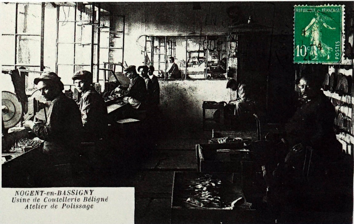 sur une vue ancienne.